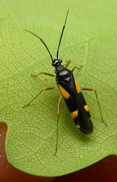 Dryophilocoris flavoquadrimaculatus, Gradignan, Gironde, France, 18 avril 2007